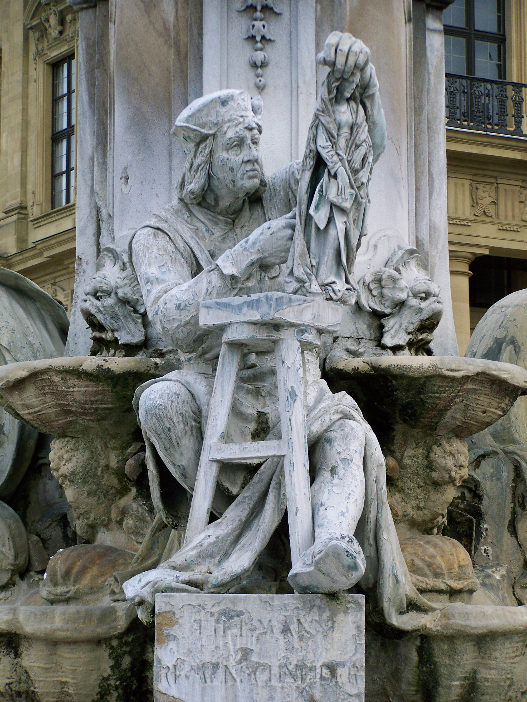 Statue von Tilman Riemenschneider am Frankoniabrunnen vor der Würzburger Residenz